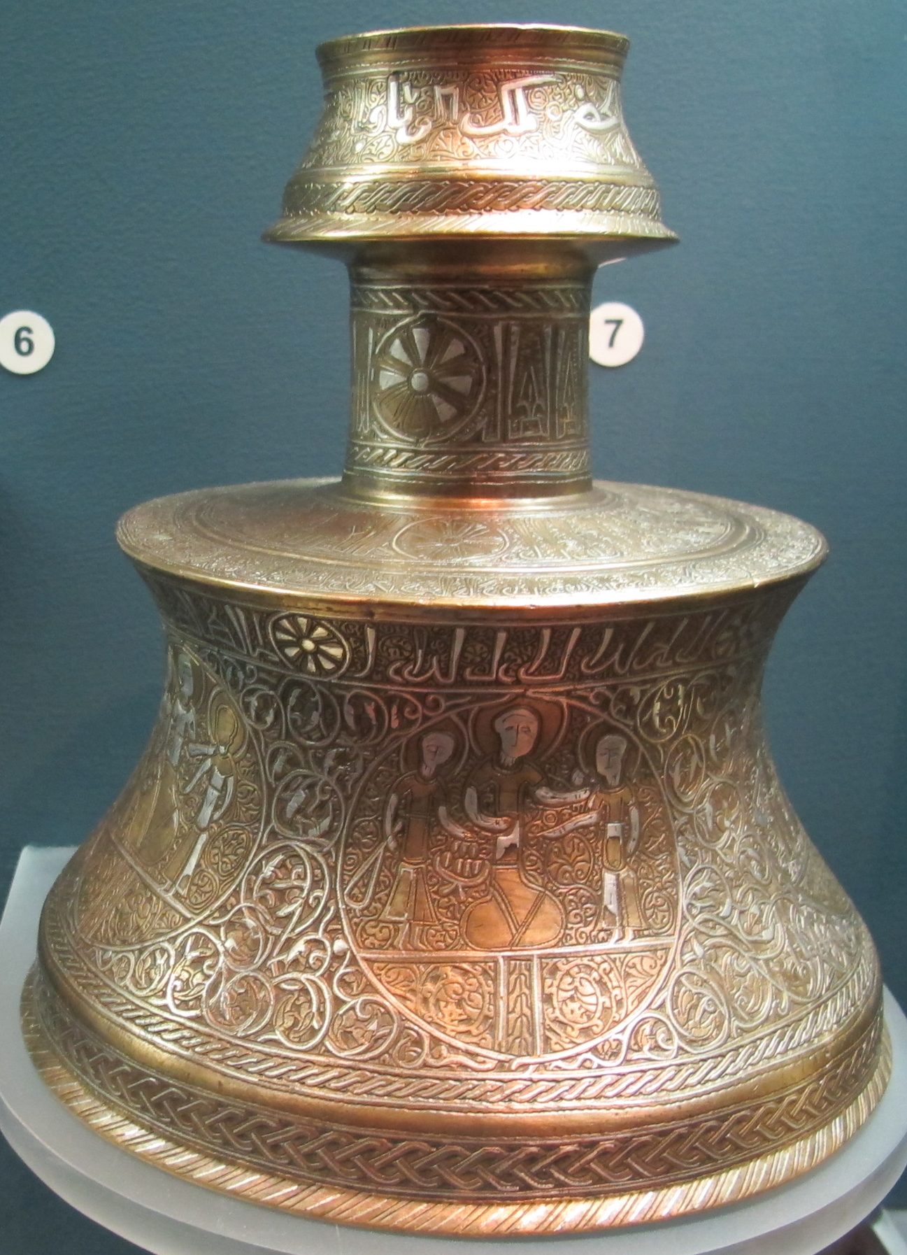 Turchia, konya, candeliere, fine del XIII sec